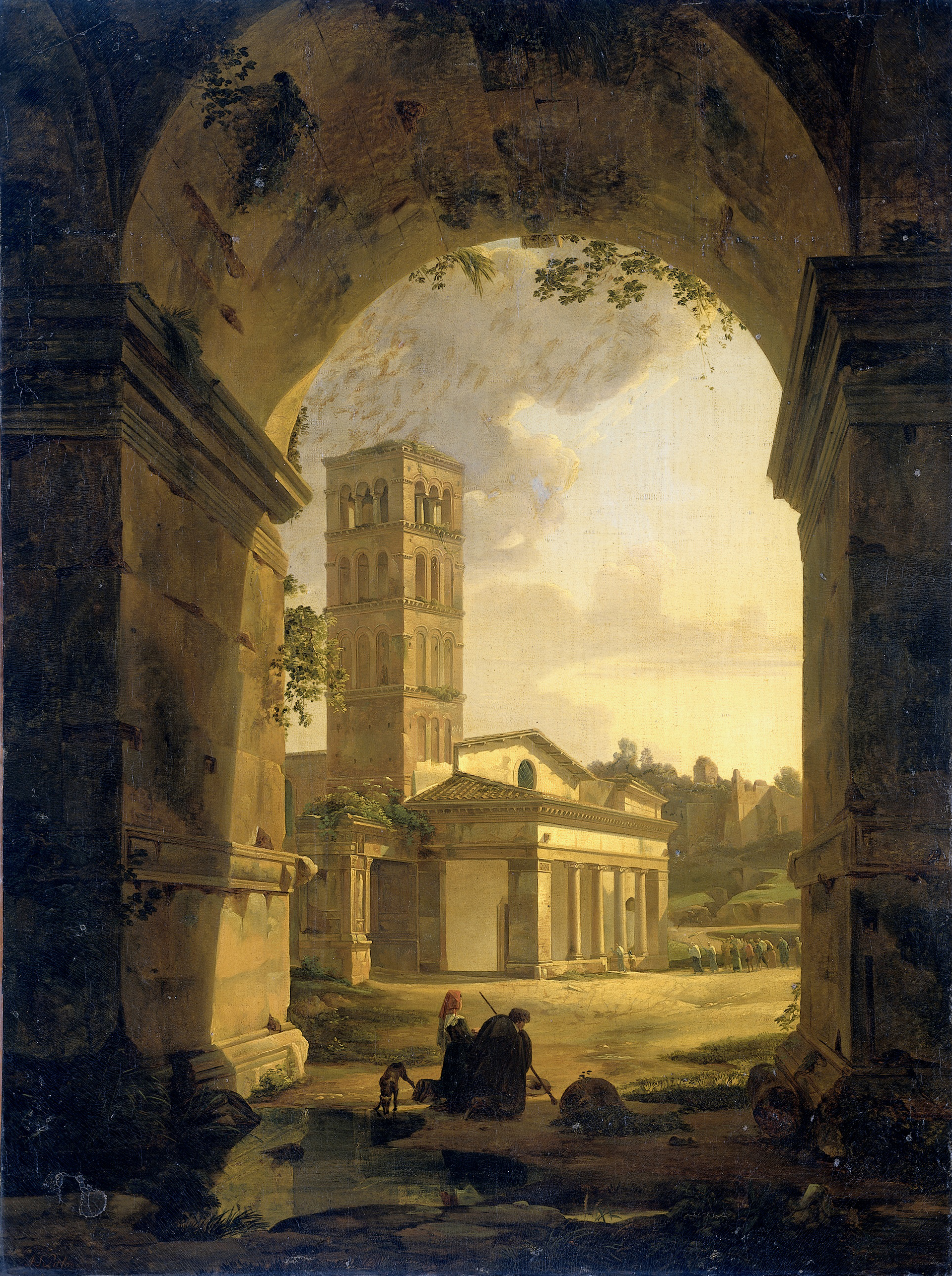 Gezicht door de Romeinse boog Janus Quadrifrons op de kerk van San Giorgio in Velabro te Rome. In de onderdoorgang knielen twee figuren voor de priester die een processie naar de kerk leidt.